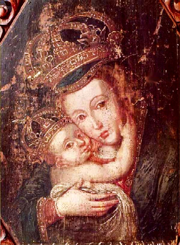 Imagen de la Virgen de Todos los Santos, La Victoria, Valle del Cauca